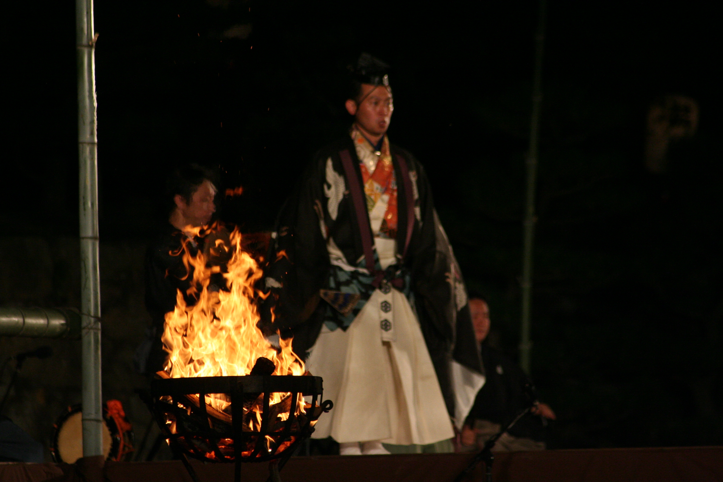 2009年7月31日に姫路城三の丸広場で行なわれた姫路薪能の様子。 観世流能楽。小鍛冶。